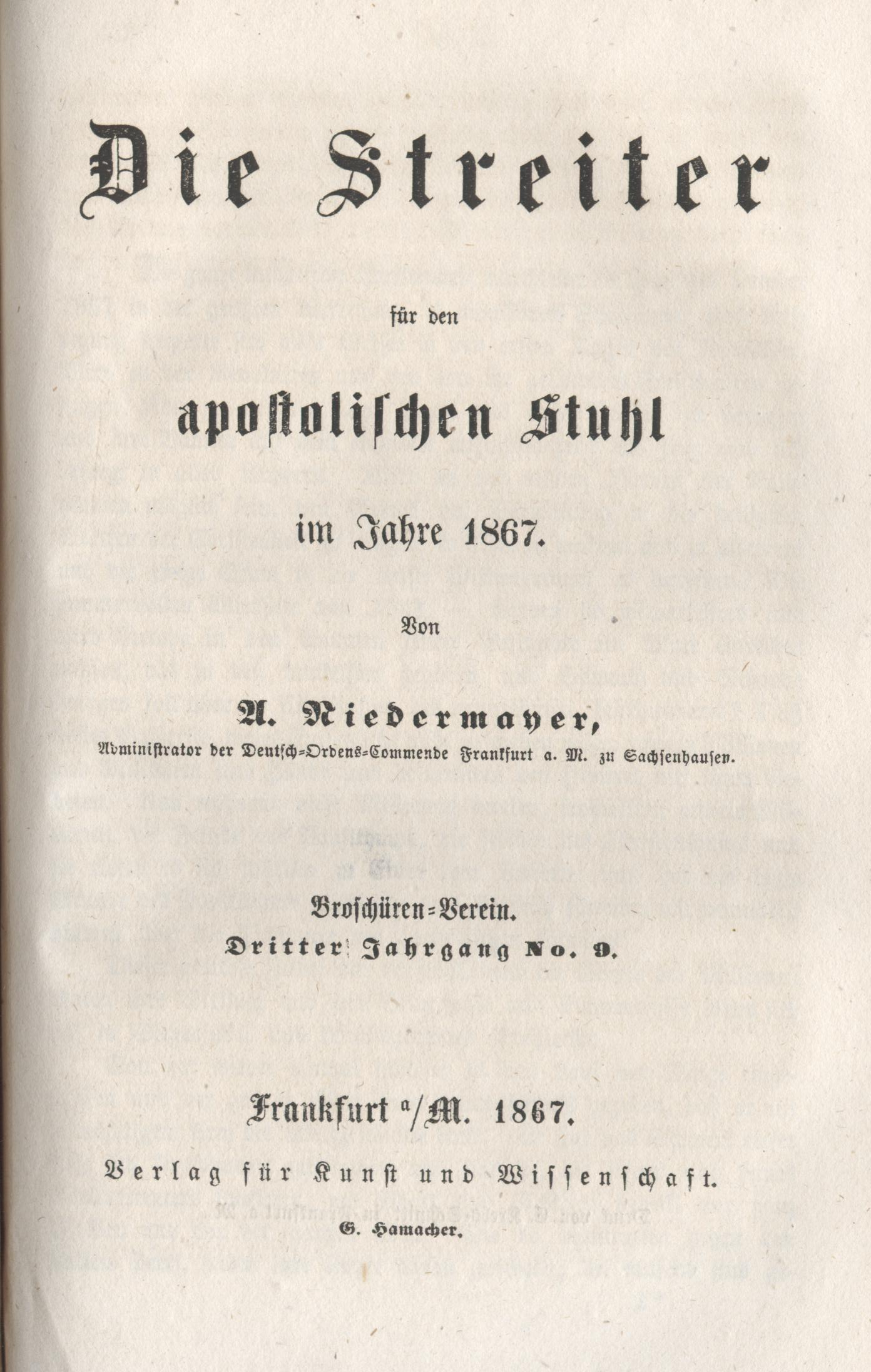 Andreas Niedermayer, deutscher Priester und Historiker, Titelblatt Publikation, 1867